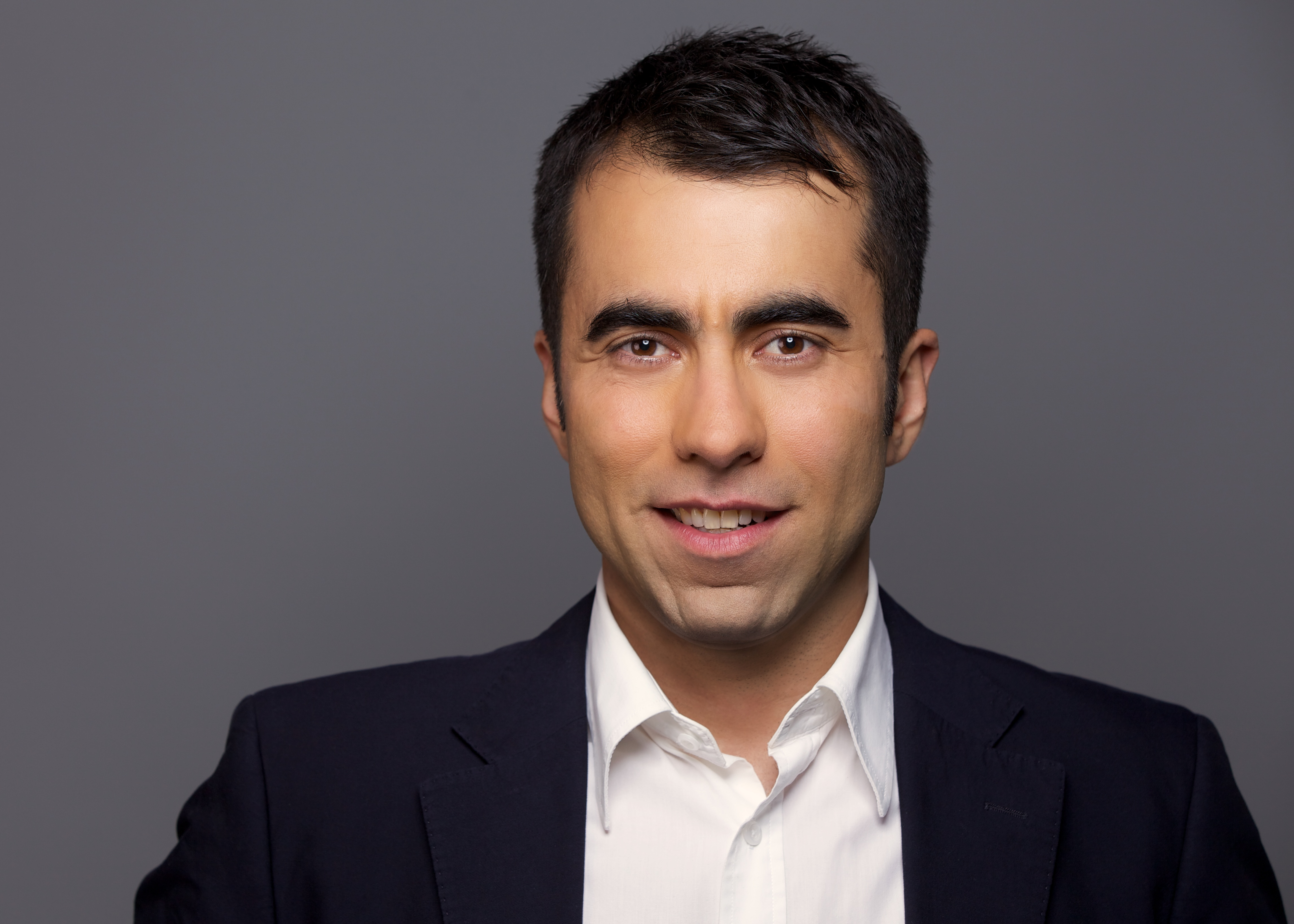 Murat Ham